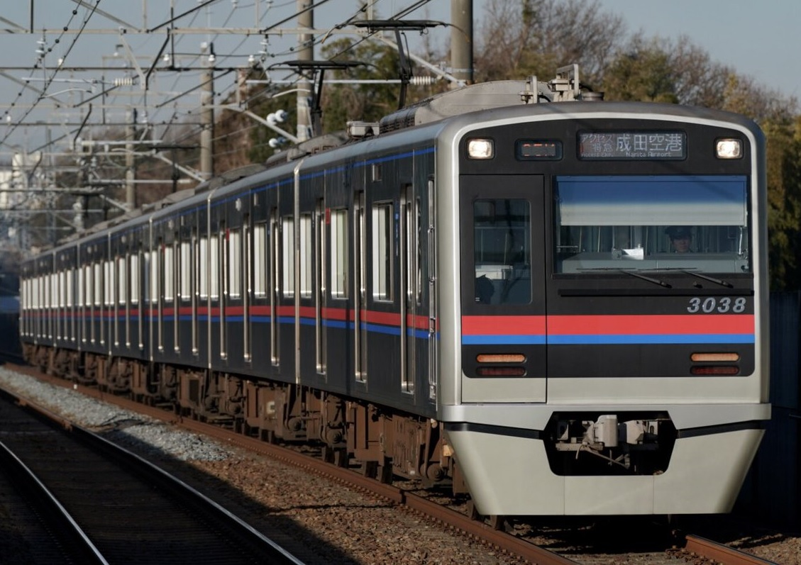 京成3000形3038F 05K運用 アクセス特急成田空港行き